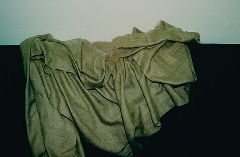 Shahtoosh Shawl